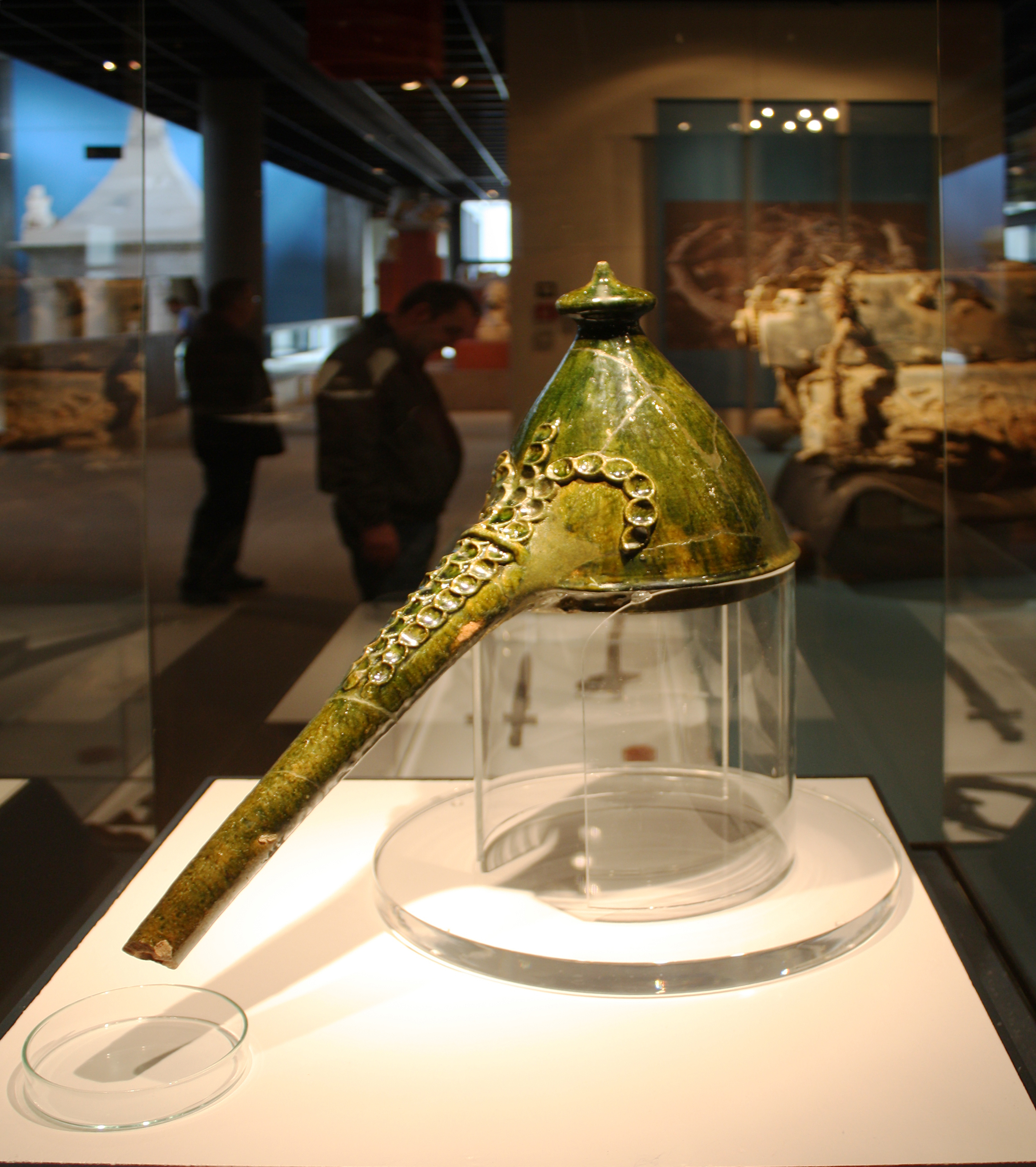 Alambic oder Destillierhelm des 16.- 17. Jahrhunderts. Ein bei archäologischen Grabungen auf dem Gelände der Wasserburg Euskirchen-Kuchenheim geborgenes Teilgerät der thermischen Verfahrenstechnik